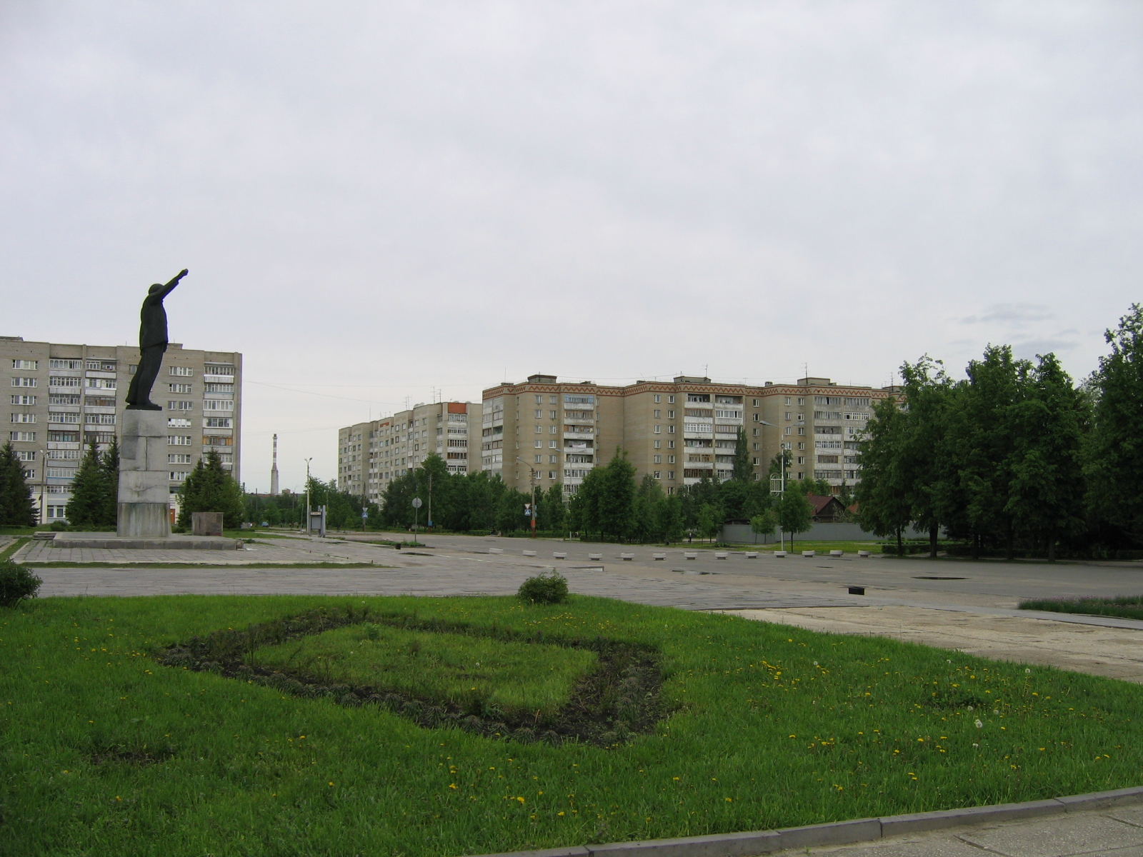 Центральный район города Кузнецка